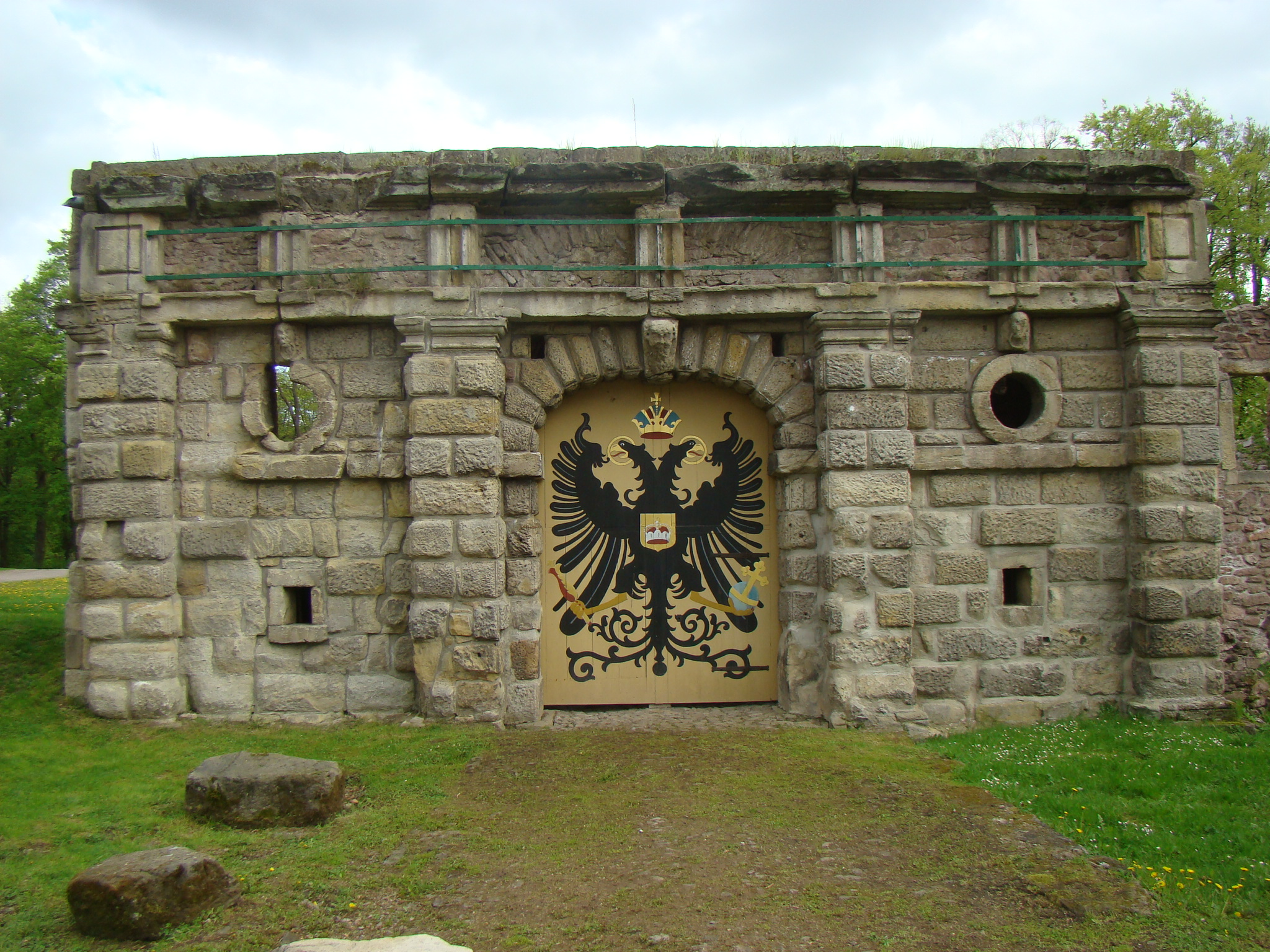 Schlossruine Gehren